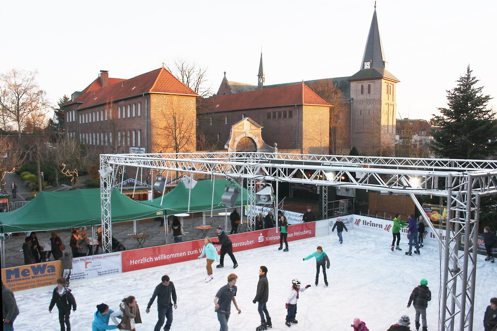 Wegberger Winterzauber, 300m2-Eisbahn auf dem Rathausplatz, im Hintergrund Pfarrkirche St. Peter und Paul mit ehem. Kreuzherrenkloster